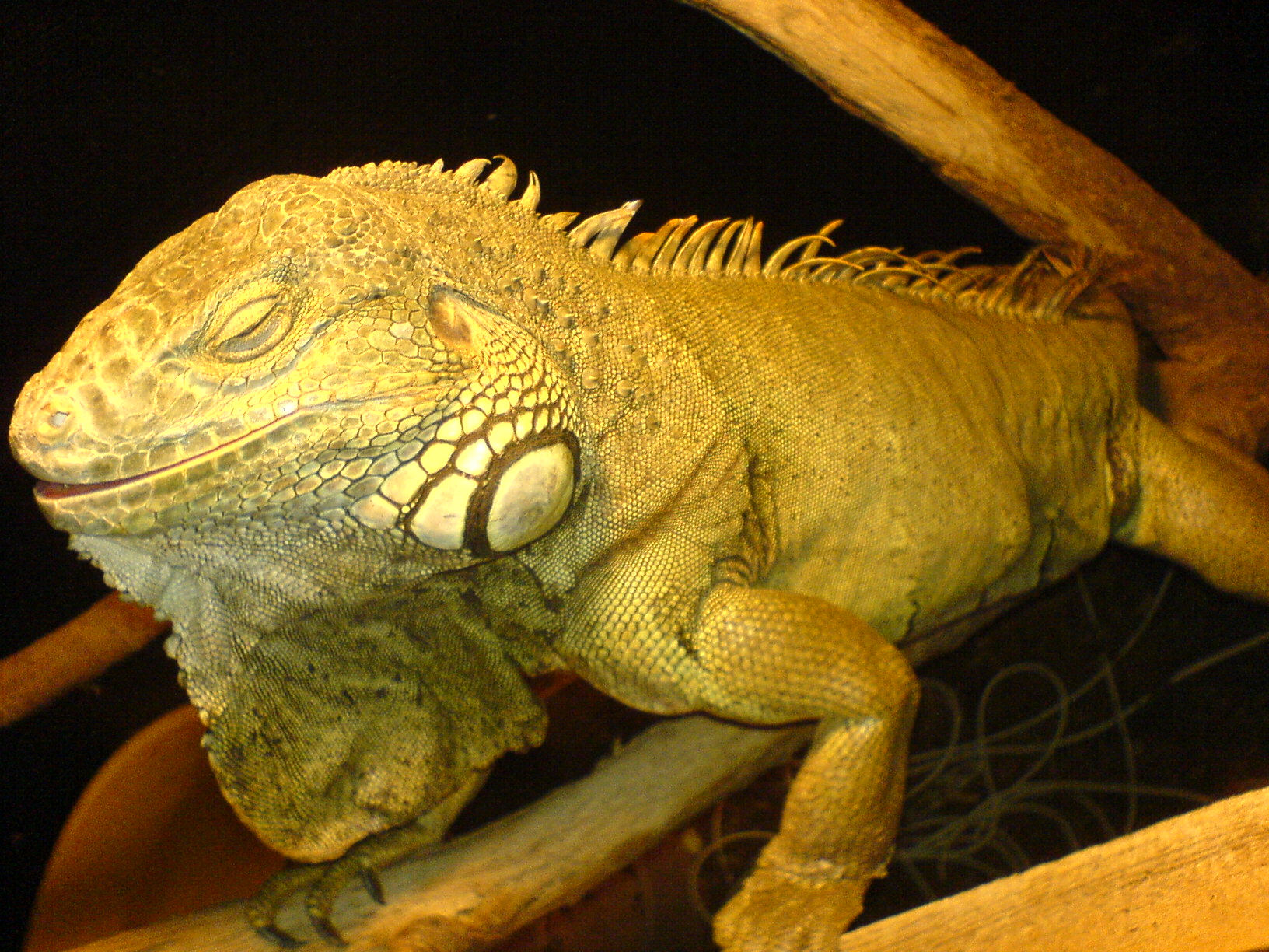 legwan